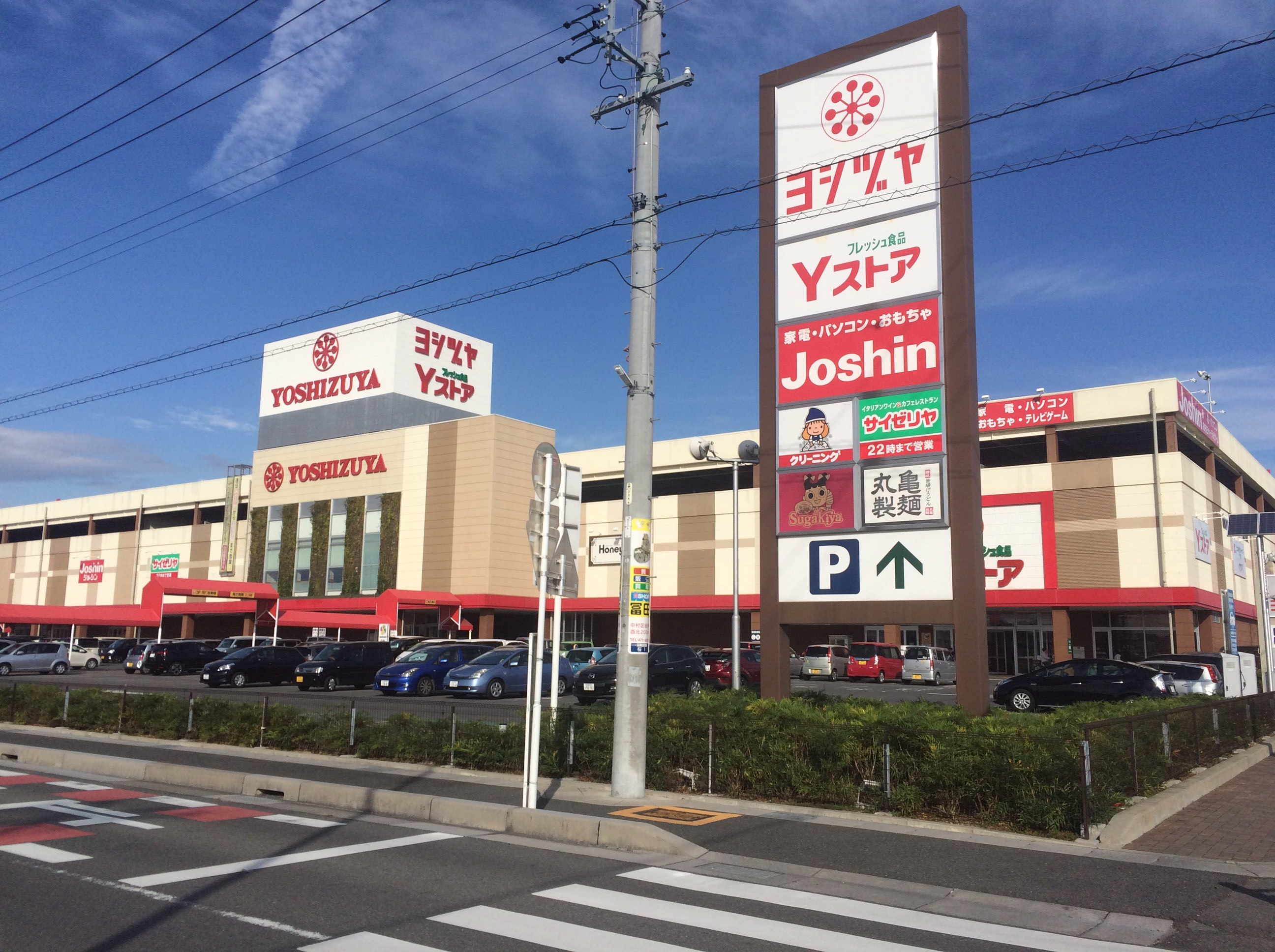 愛知県海部郡蟹江町にあるヨシヅヤJR蟹江駅前店。